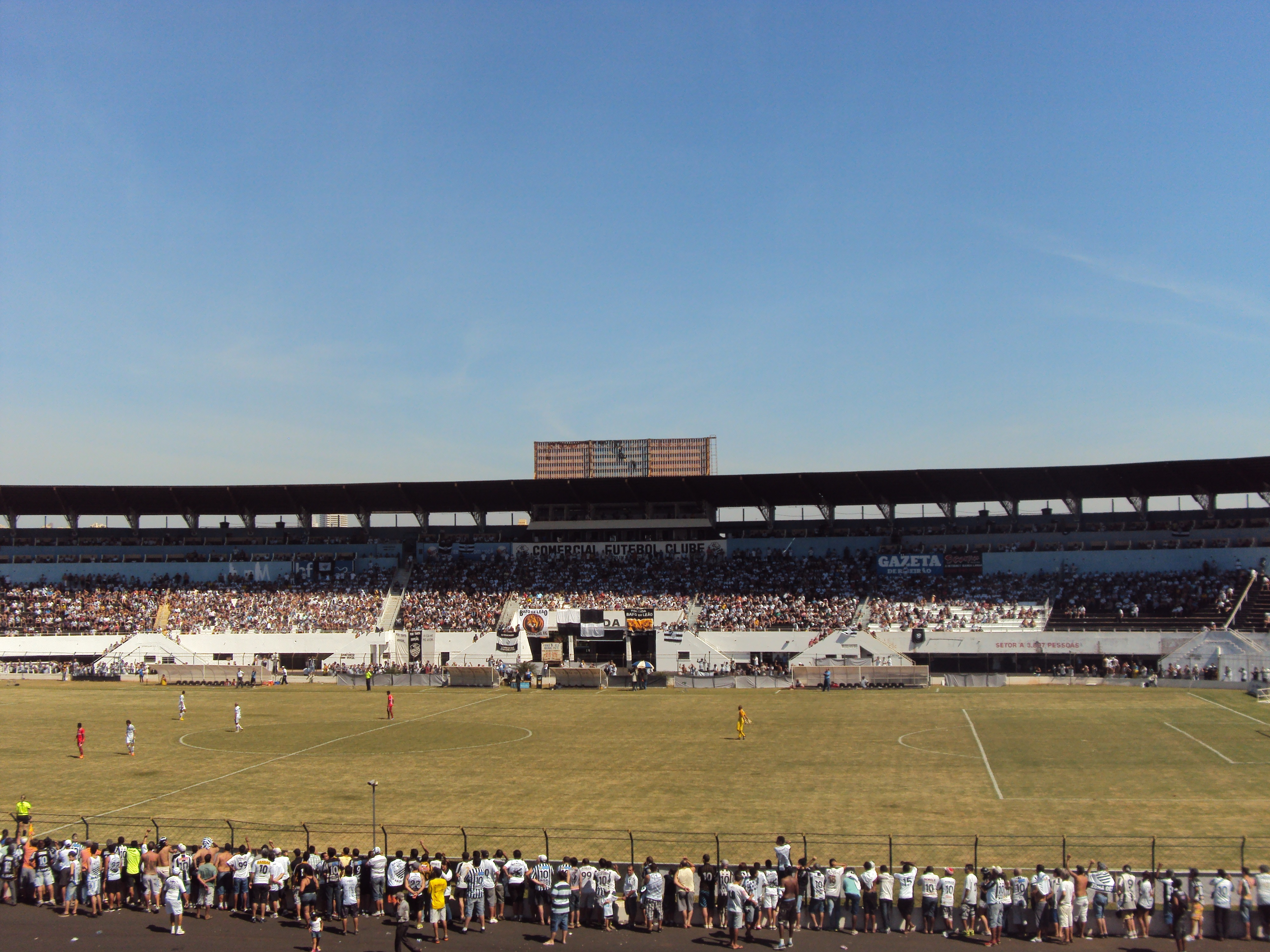 Jogo entre Comercial x Capivariano, realizado no dia 28/04/13 - Campeonato Paulista da Série A2